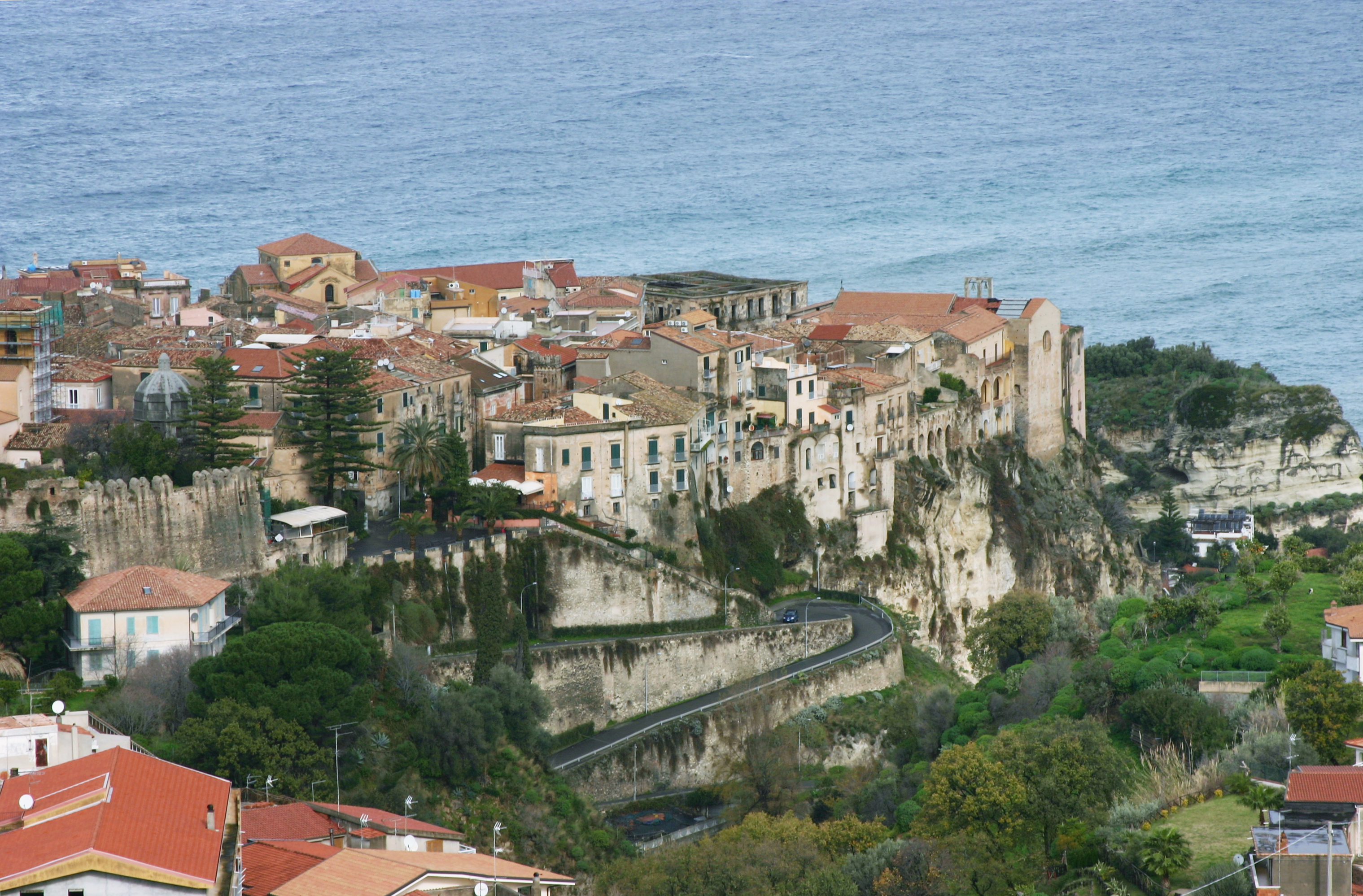 Tropea